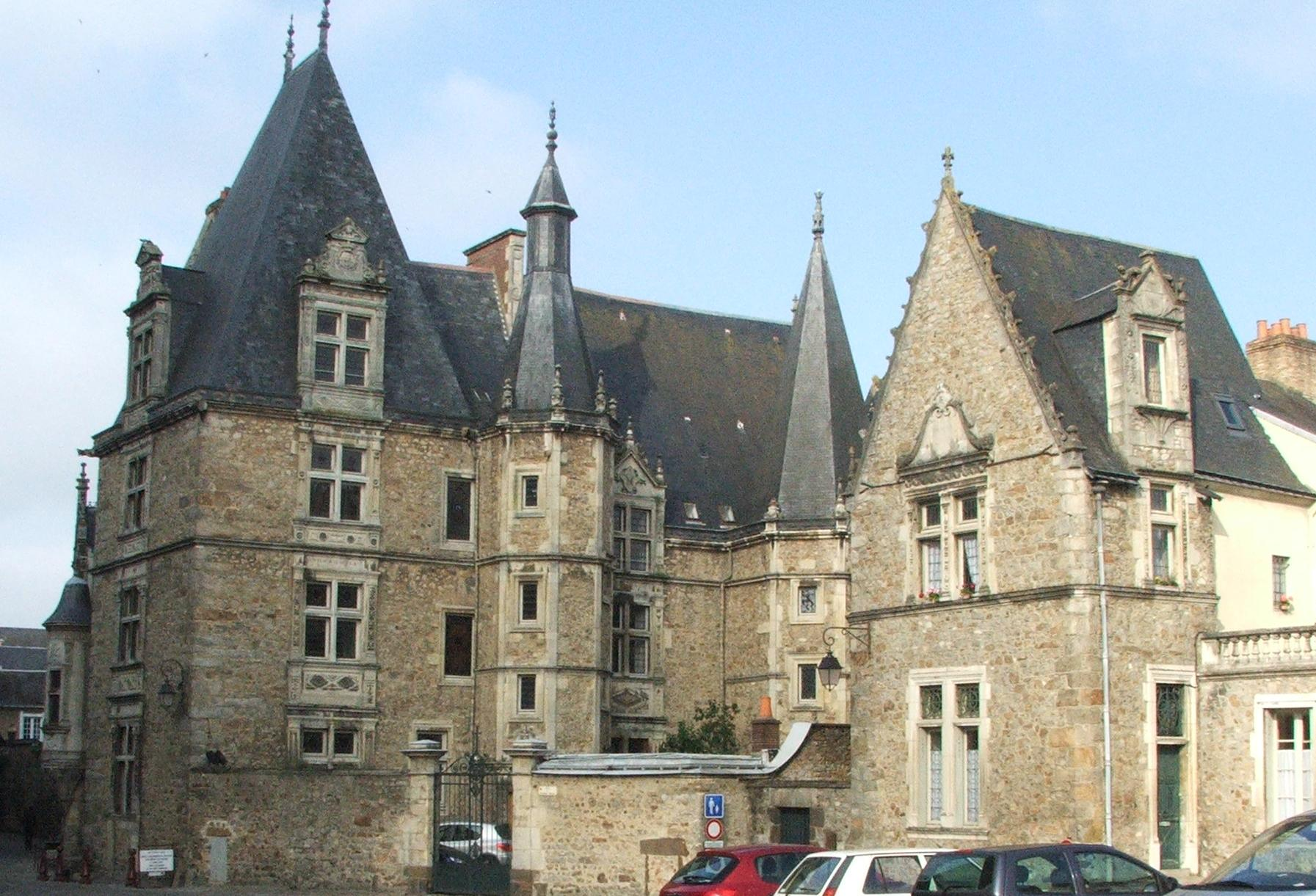 Le palais du Grabatoire dans le vieux Mans, ancienne demeure canoniale, actuelle résidence de l'évêque.